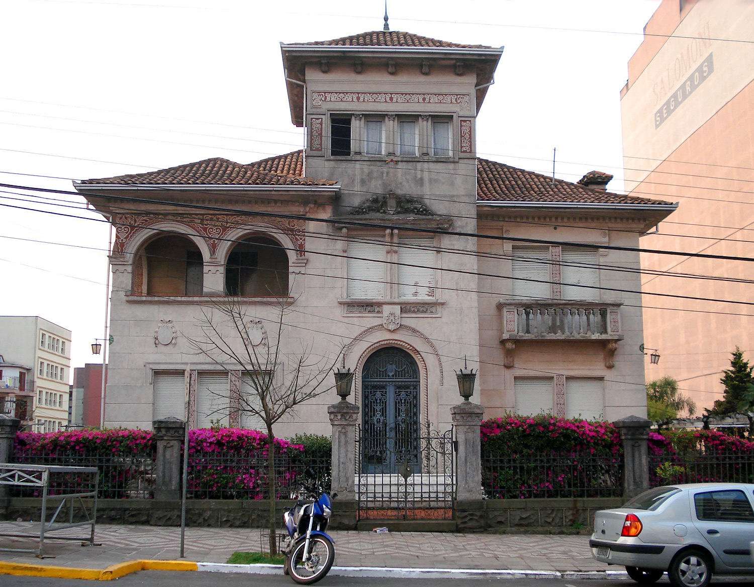 Palacete Eberle, um prédio histórico de Caxias do Sul, Brasil.